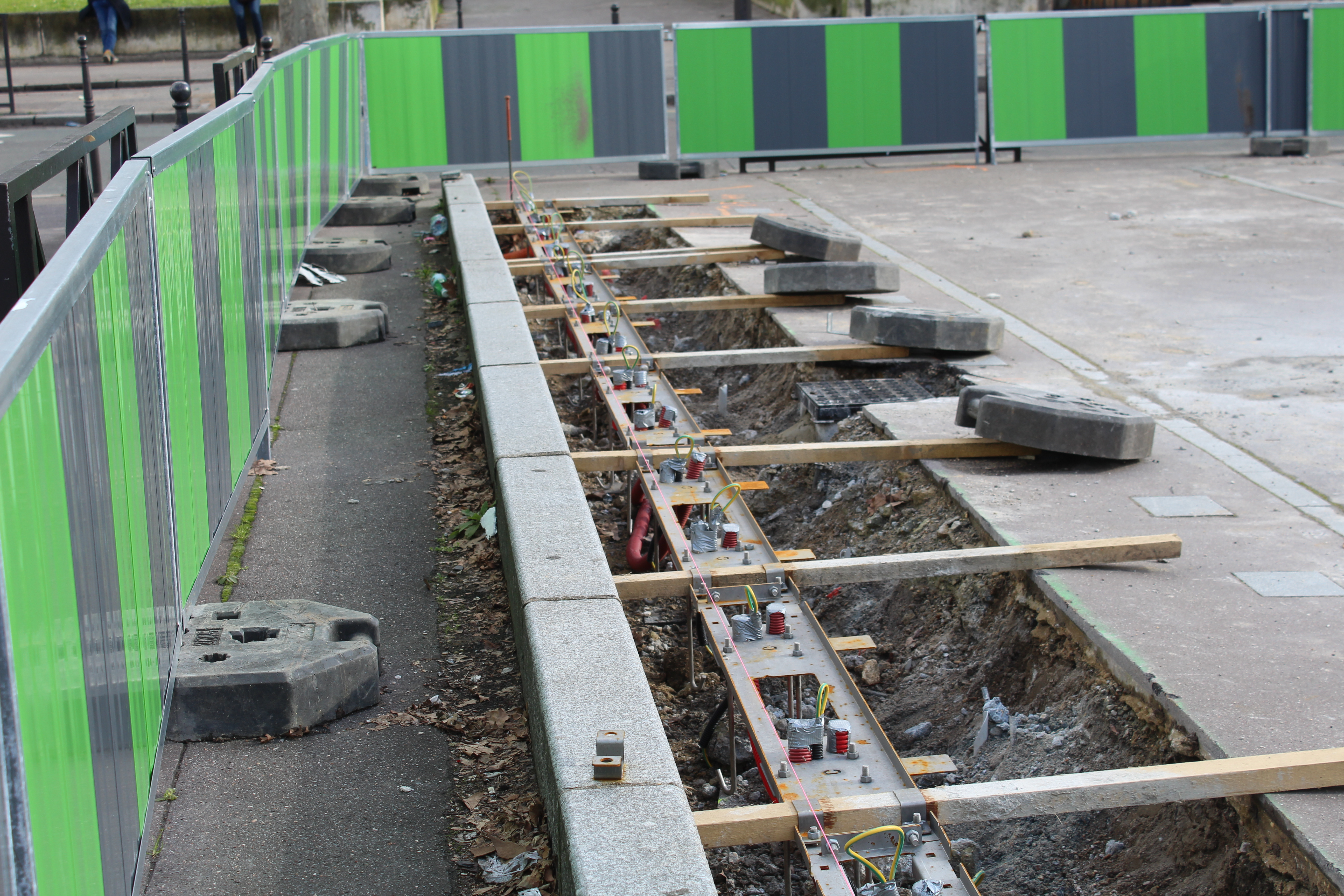 Station Vélib' en chantier le long du boulevard Lannes tout près de la porte Dauphine, Paris.